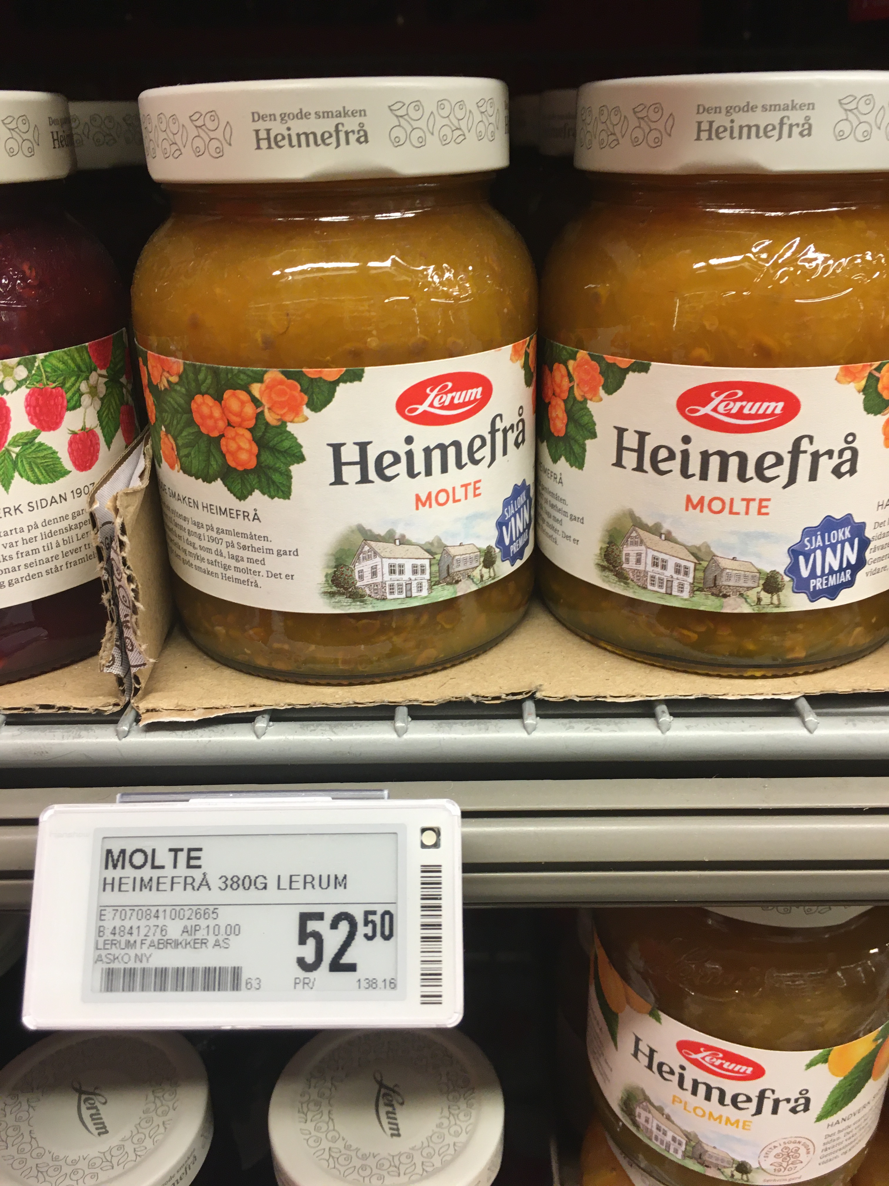 Molte